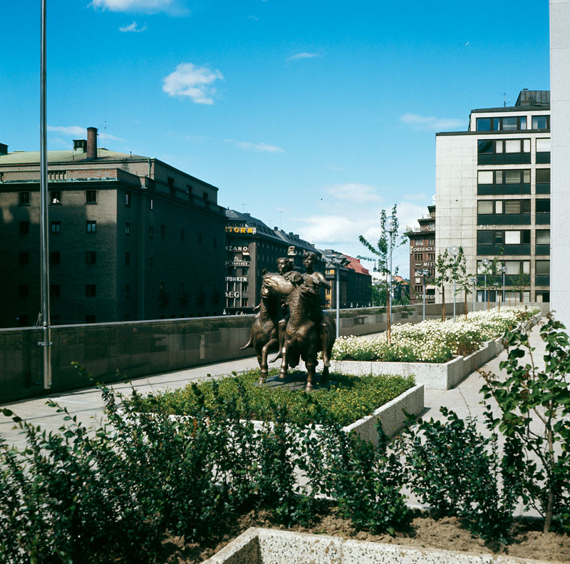 Planteringar på terrassen till Göteborgs Banks hus vid Sveavägen. Bronsskulptur av Stig Blomberg: ""Flores och Blanzeflor"". Vy åt nordväst